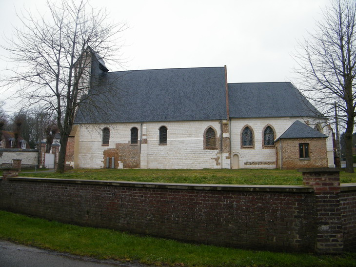 Port-le-Grand, église Saint-Honoré.